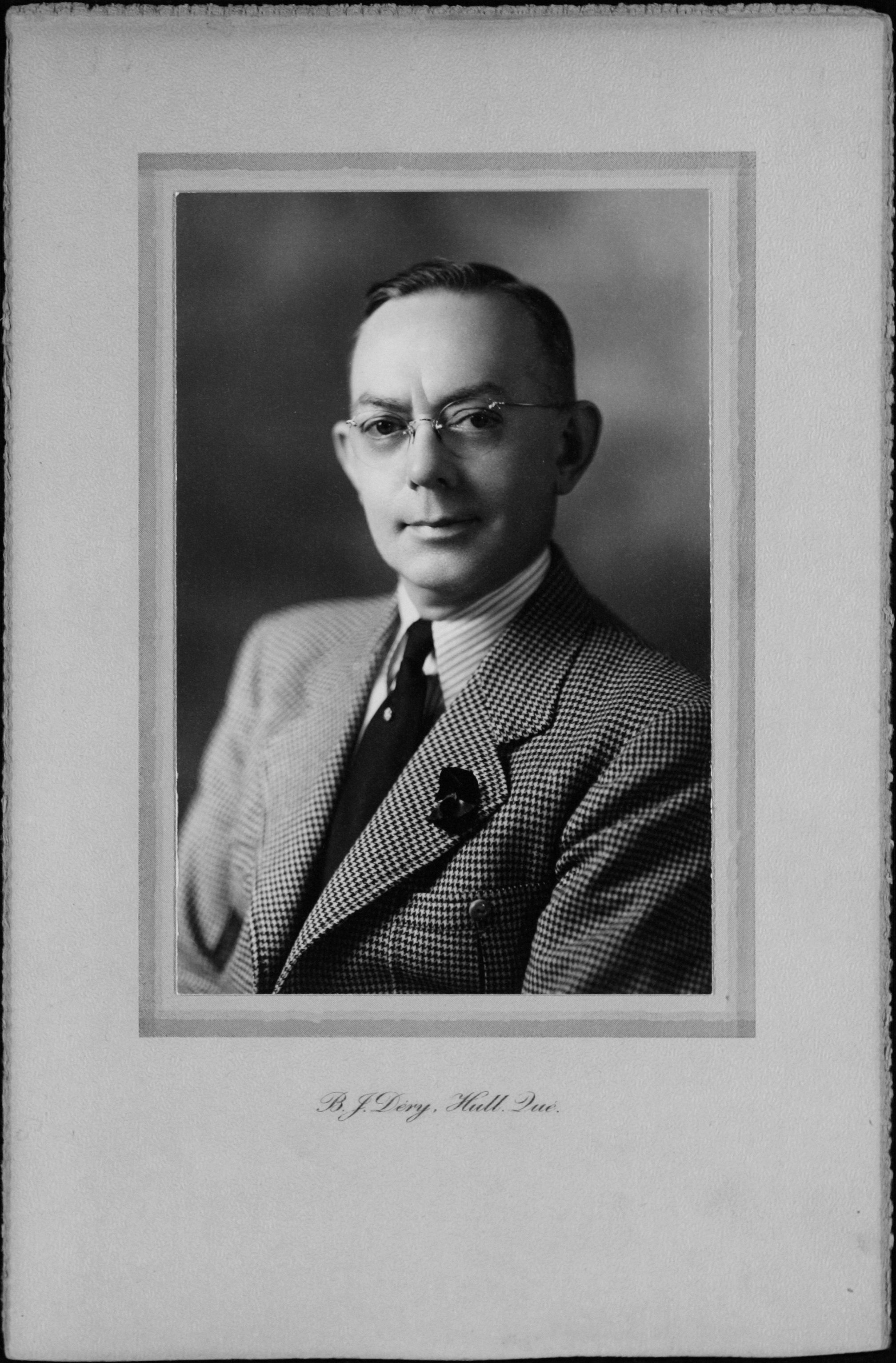 Portrait d'Alphonse Moussette, maire de la ville de Hull entre 1936 et 1940 ainsi qu'entre 1948 et 1951.